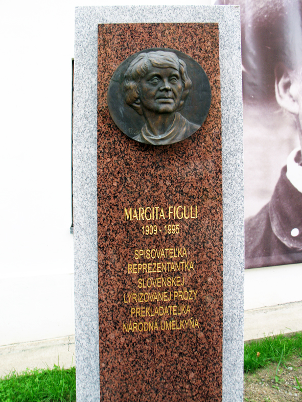 Pamätná tabuľa s reliéfom Margity Figuli v Parku dejateľov v Dolnom Kubíne